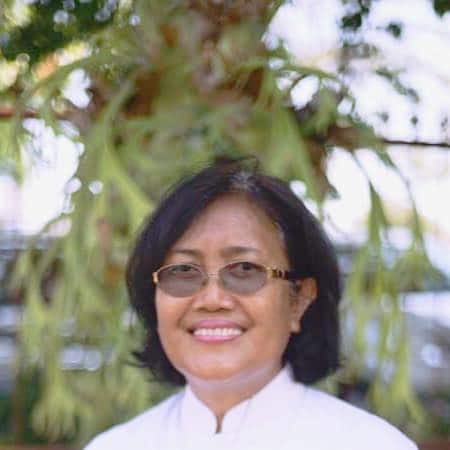 Pdt. Made Gunaraksawati Mastra, S.E, M. Div